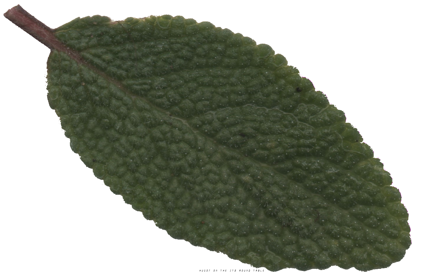 Salvia officinalis - de mon propre jardin - passé au scanner en 1200ppp